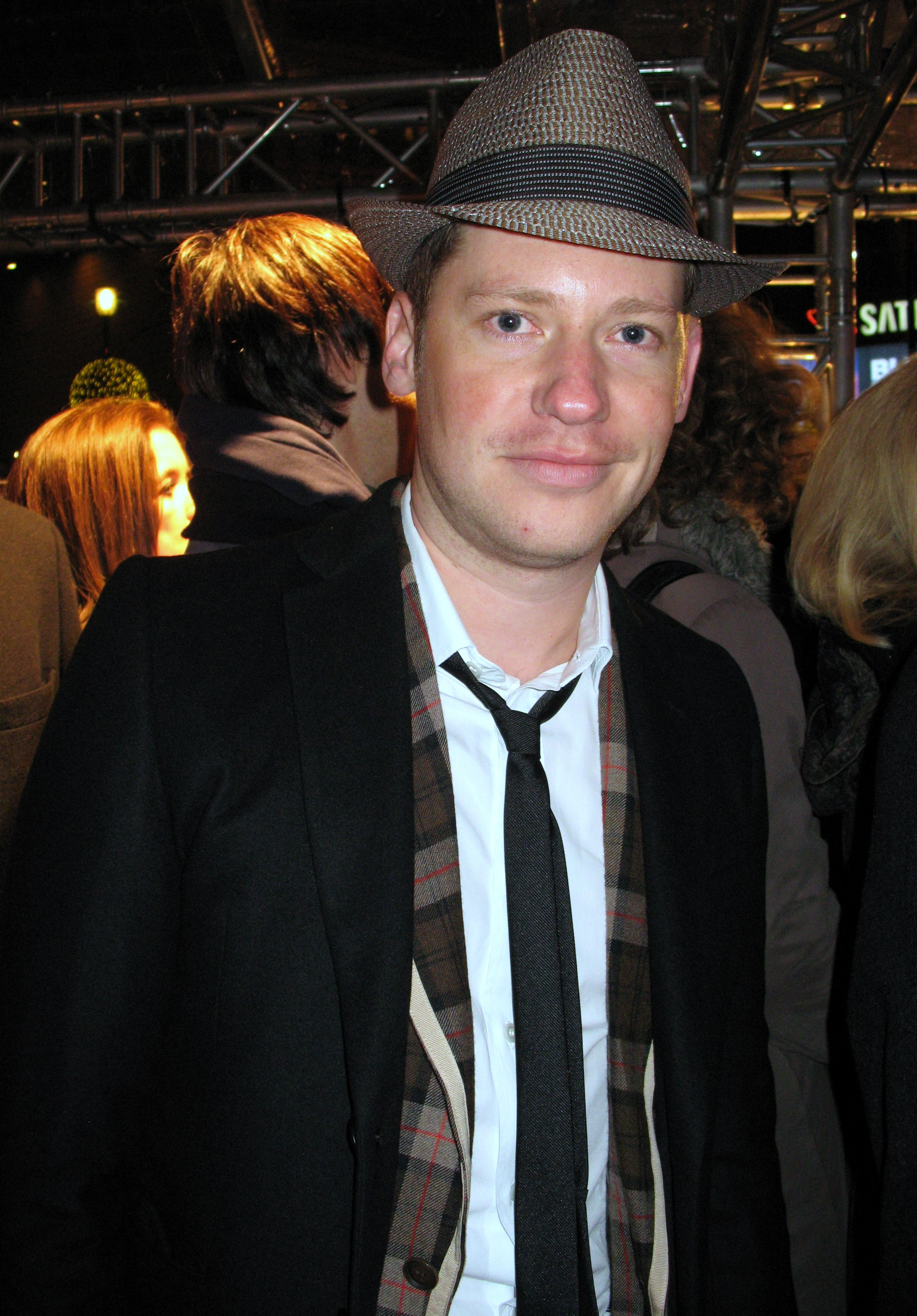 Marco Kreuzpaintner bei der Eröffnung der Berlinale 2009, 05.02.2009